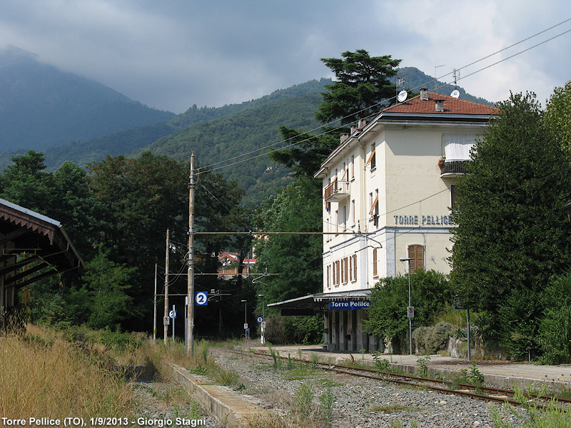 Stazione ferroviaria di Torre Pellice.